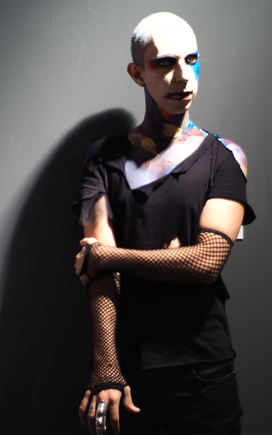 Iván M.I.E.D.H.O. en el Ateneo de Madrid